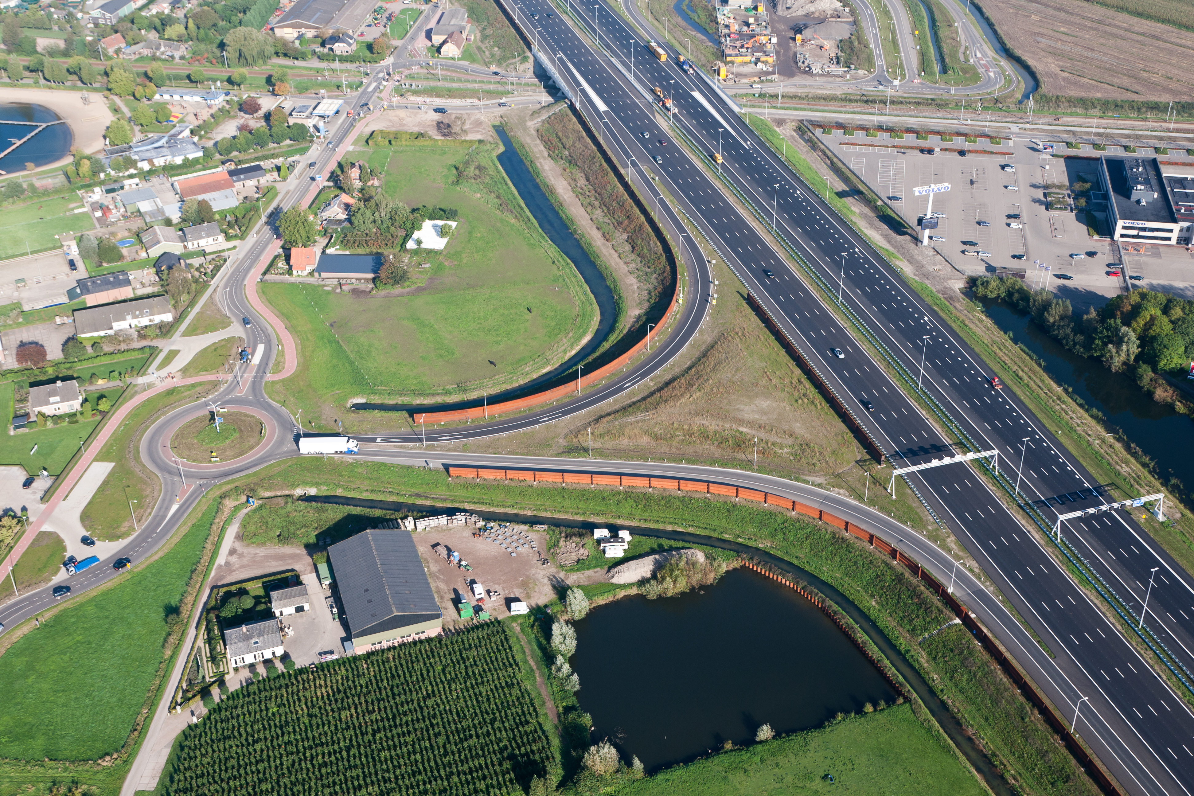 Aansluiting van de A2 bij Beesd - luchtfoto